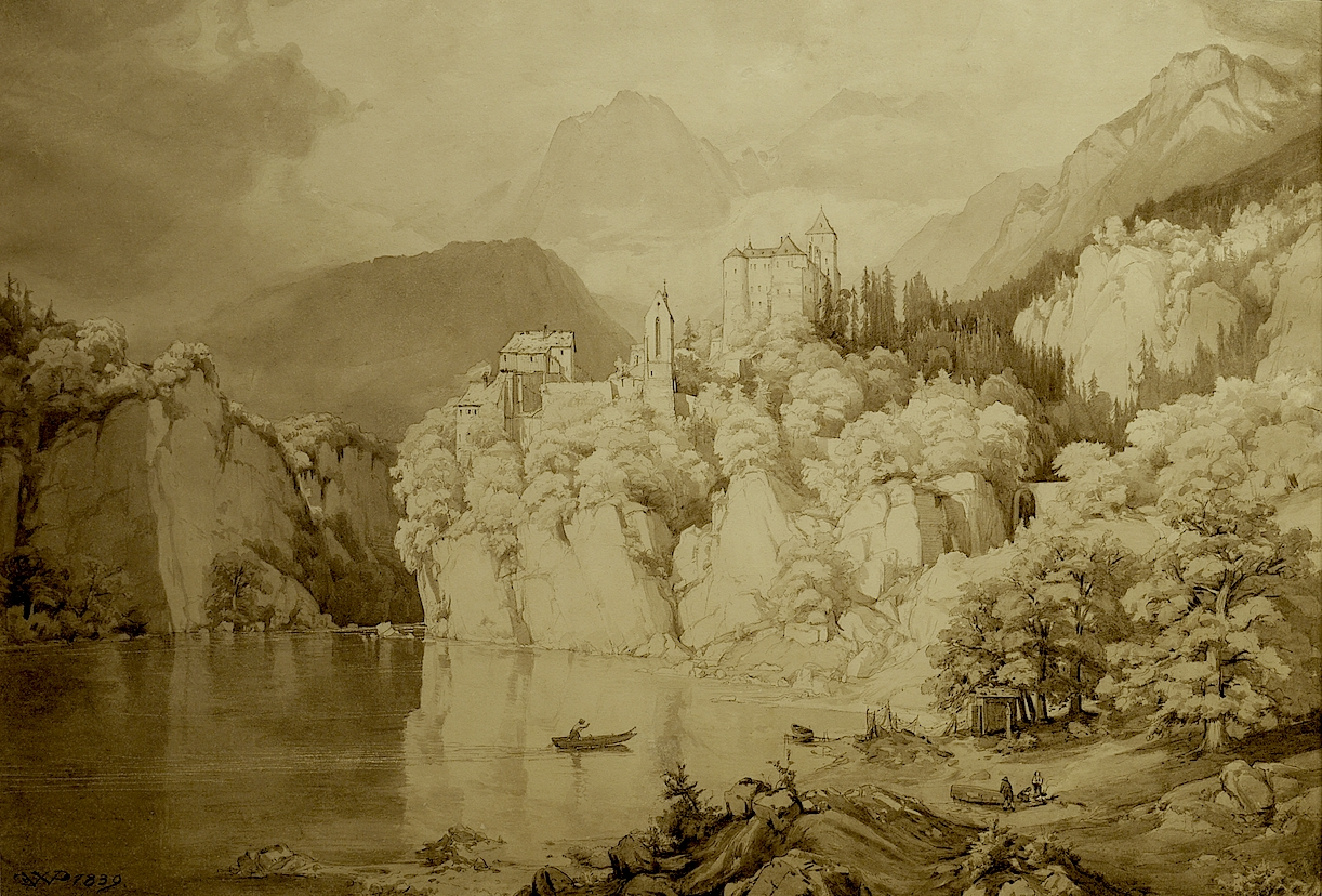 Вильгельм Позе. Карандаш и тушь сепия на бумаге: "Альпийский ландшафт с замком".